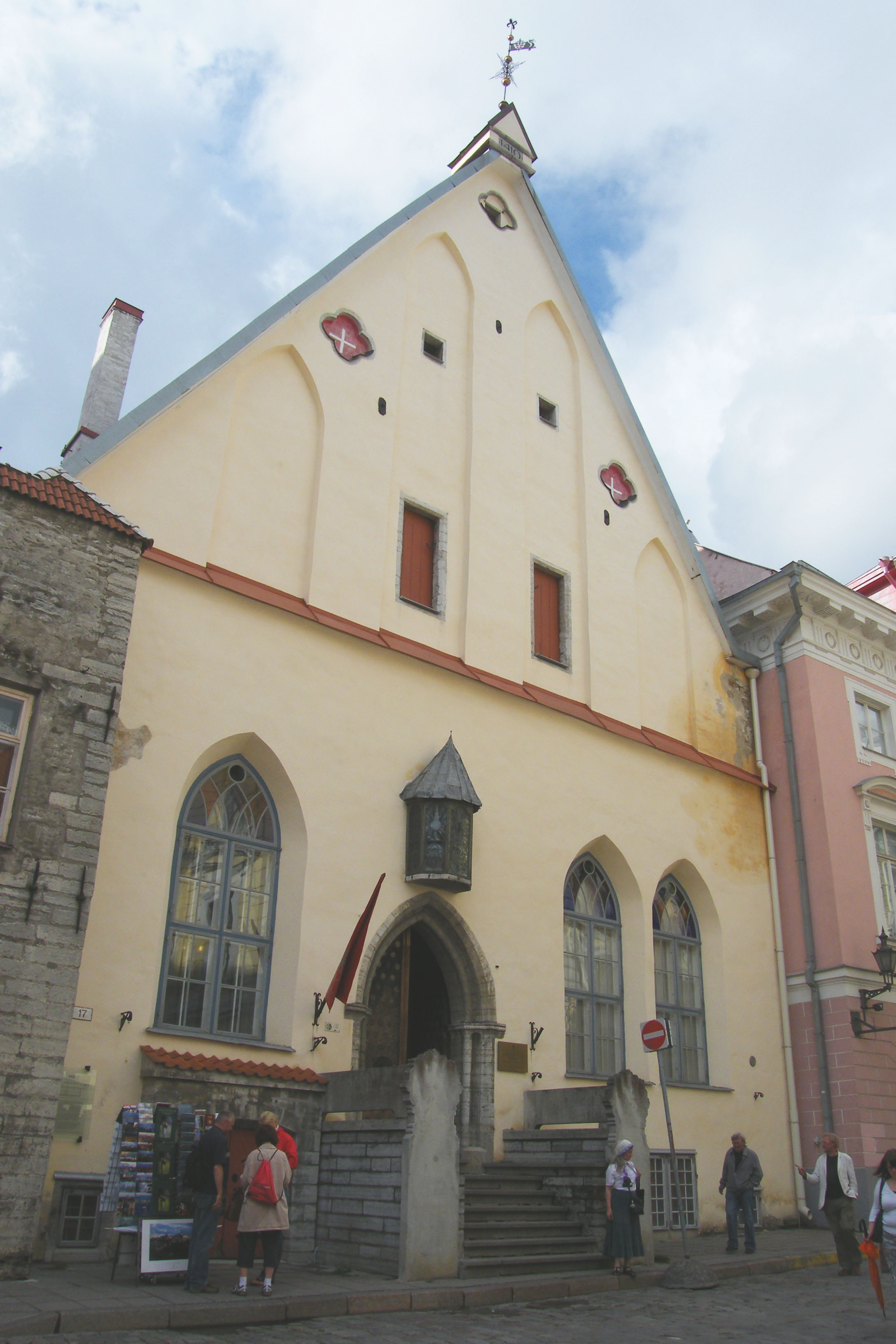 Suurgildi hoone Tallinnas Pikal tänaval